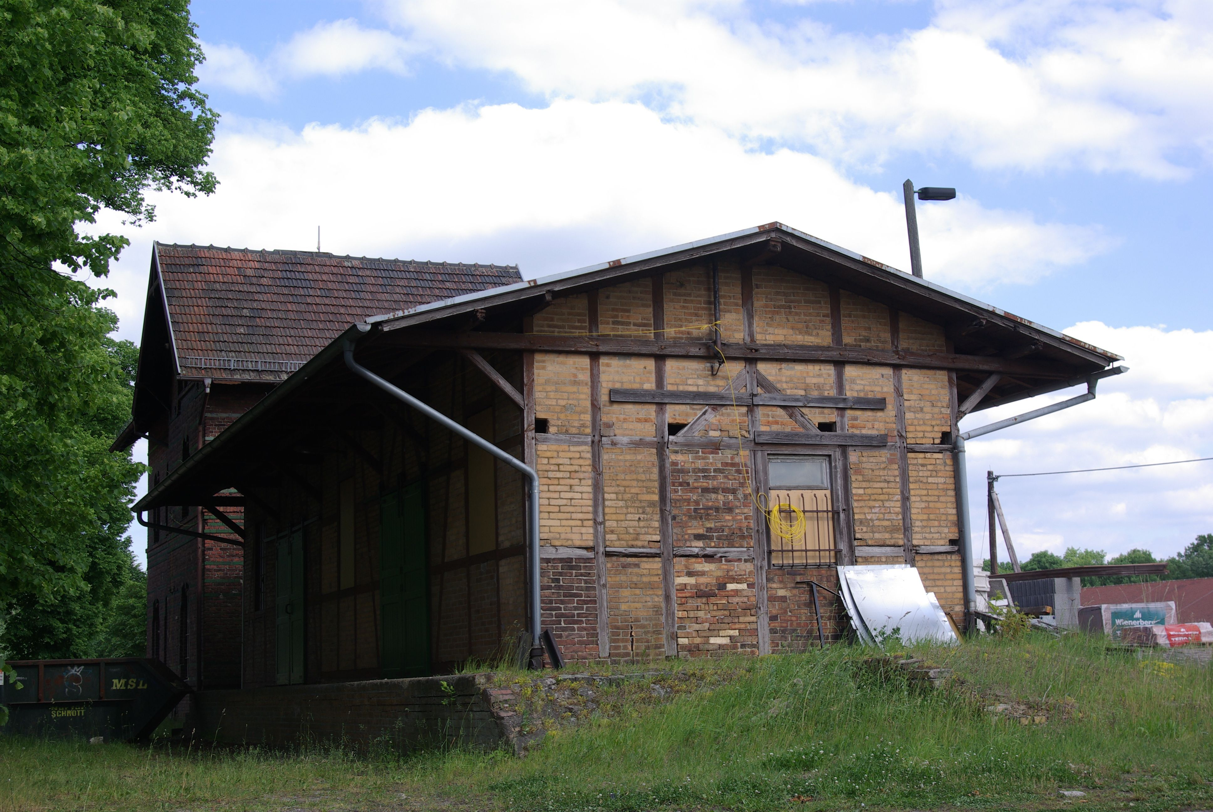 Tauche in Brandenburg. Der Bahnhof im Ortsteil Lindenberg steht unter Denkmalschutz. Der Blick geht auf den Güterschuppen.